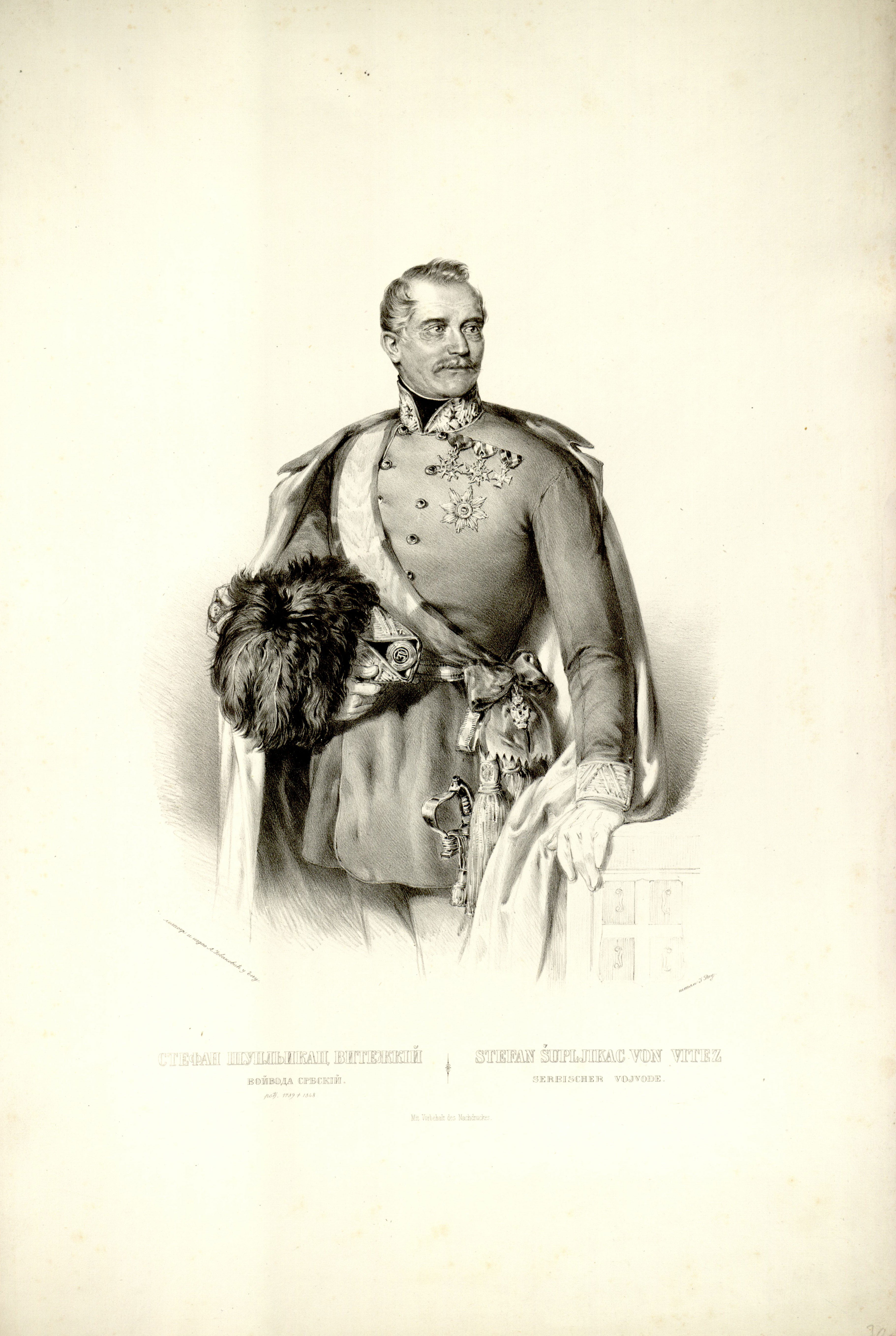 Lithograph of Stefan Šupljikac (Stevan Šupljikac) by Anastas Jovanović. Caption: литогр. и издао А. Іовановић у Бечу.штам І. Рау. СТЕФАН ШУПЛЬИКАЦ ВИТЕЖКІЙ Войвода србскій. рођ. 1789.+1848. STEFAN ŠUPLJIKAC VON VITEZ serbischer Vojvode. Mit Vorbehalt des Nachdruckes.